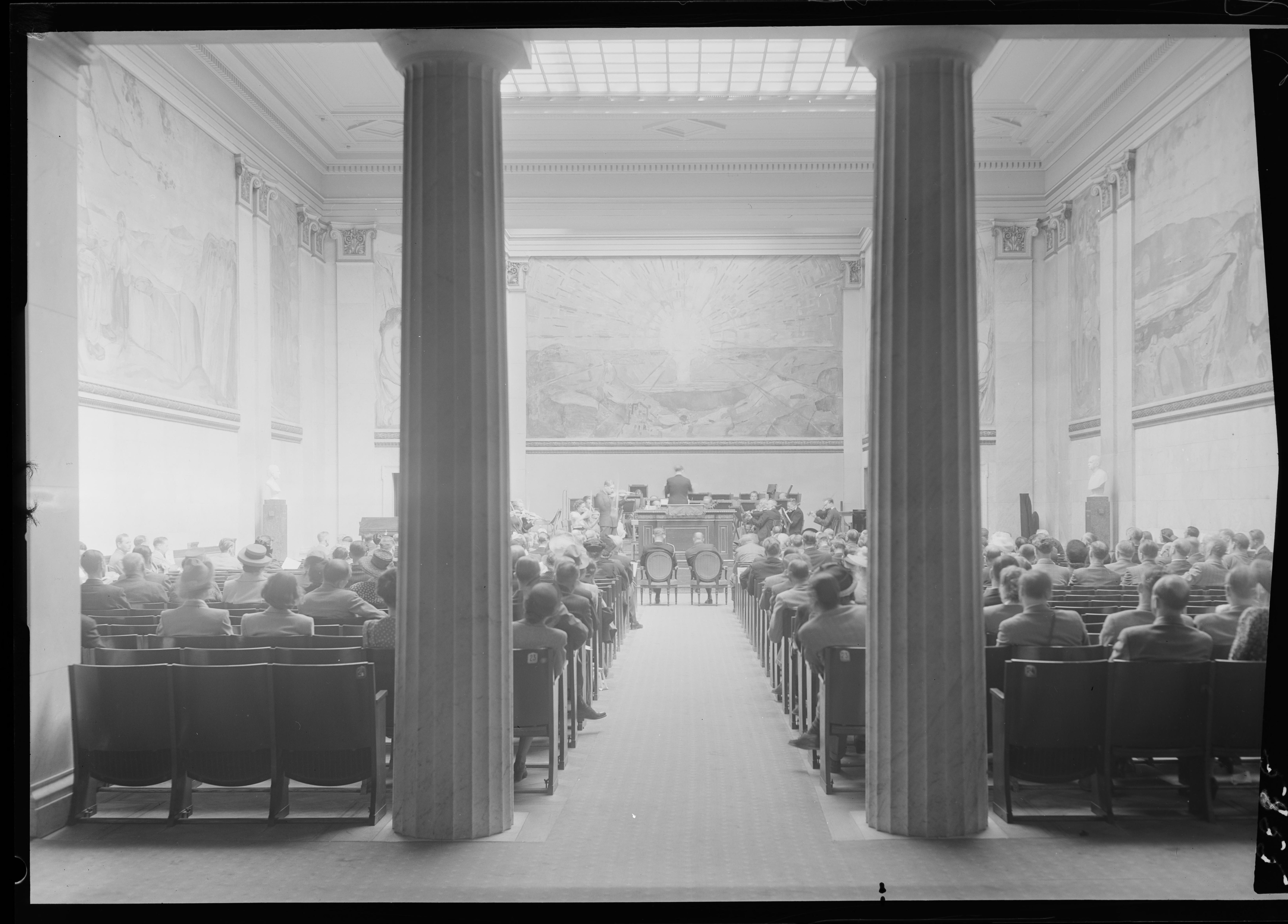 Bildet er hentet fra Nasjonalbibliotekets bildesamling. Anmerkninger til bildet var: fotograf :ukjent Oslo, Oslo, Oslo